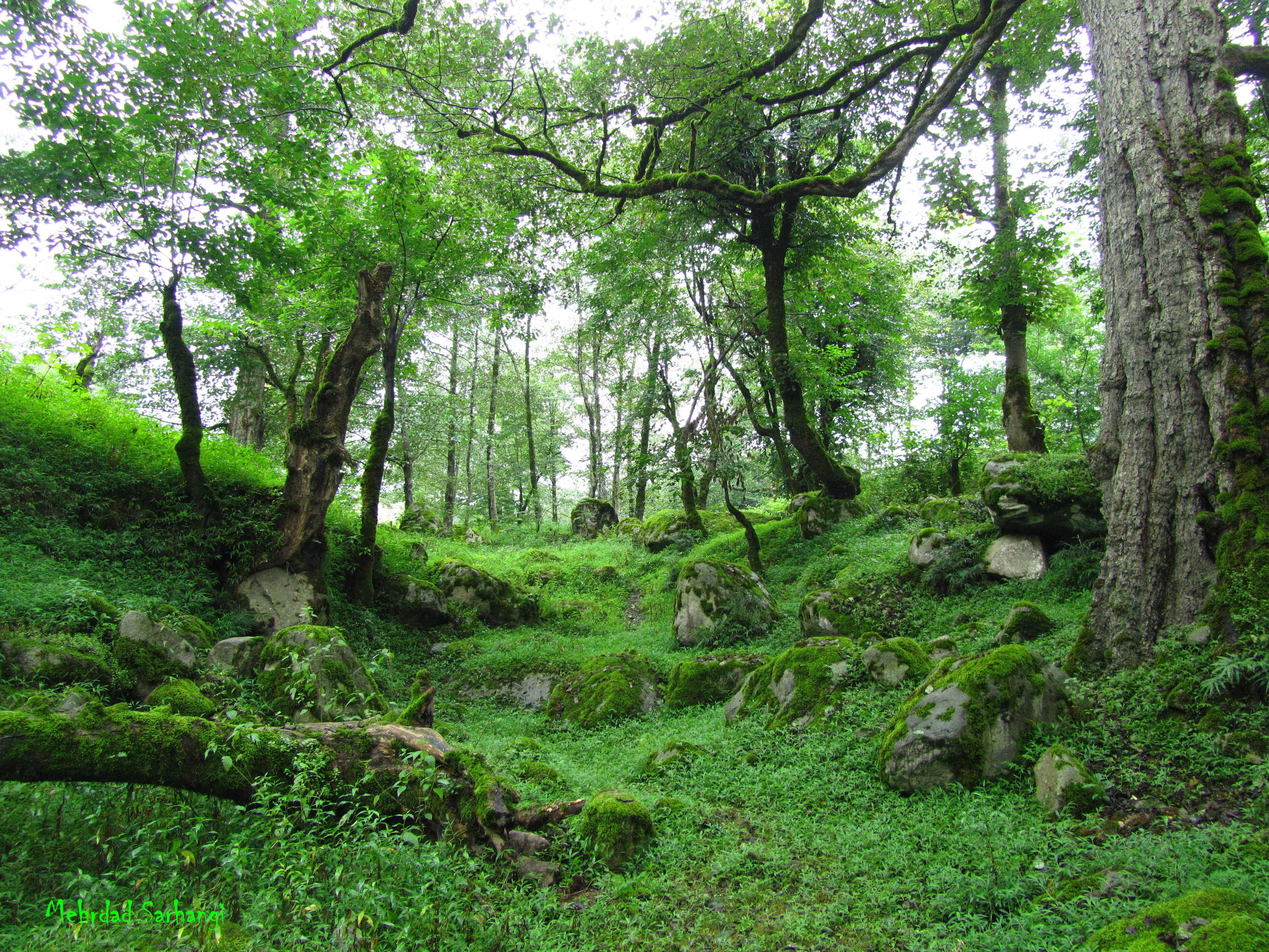 طبیعت زیبای جاده 3هزار